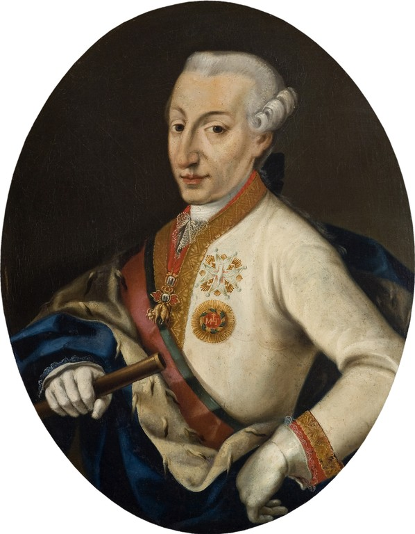 ritratto di Ercole III d'Este, ultimo membri della famiglia degli Este